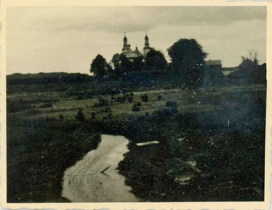 Беларуская (тарашкевіца): Талачын (Tałačyn), рака Друць (Druć). Царква Покрыва Багародзіцы да надбудовы купалоў-цыбулінаў